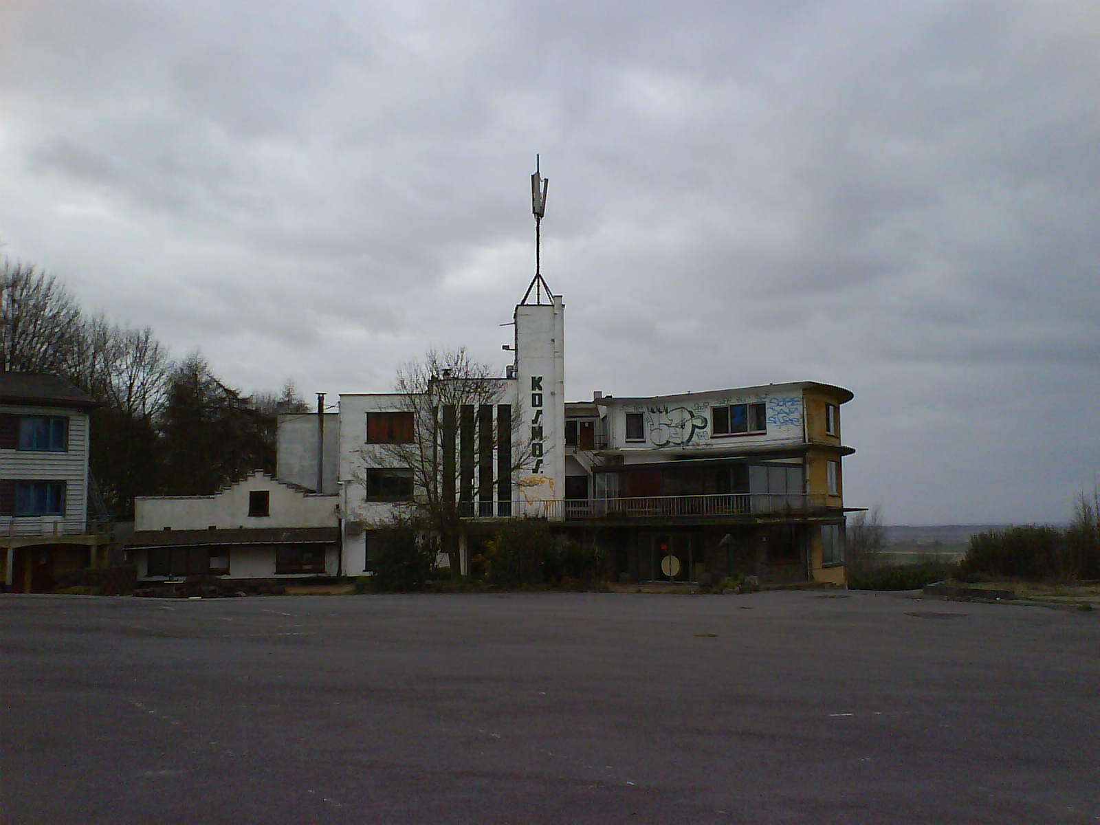 Het oude hoofdgebouw Kosmos, daterend uit 1934. Werd enkele keren uitgebreid. Dit is de staat in 2008